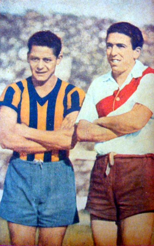 Waldino Torito Aguirre (Rosario Central) y Ángel Labruna (River Plate).